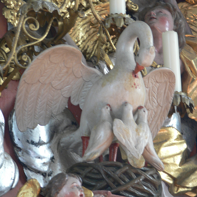 Pfarr- und Wallfahrtskirche St. Philippus und Jakobus, Bergatreute Hochaltar: Vogelnest